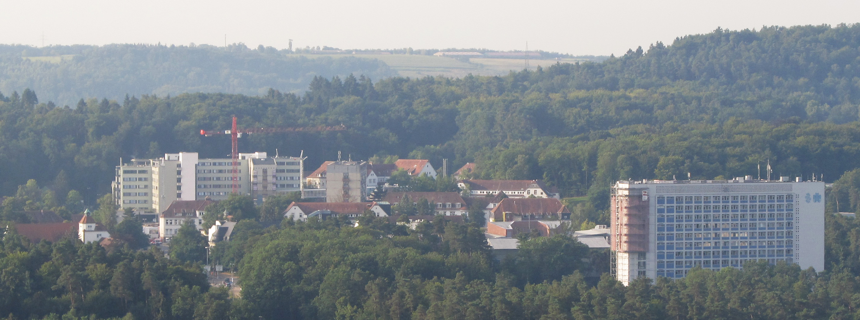 Blick vom Schlossberg auf das Gelände des Universitätsklinikums Homburg, Saarland